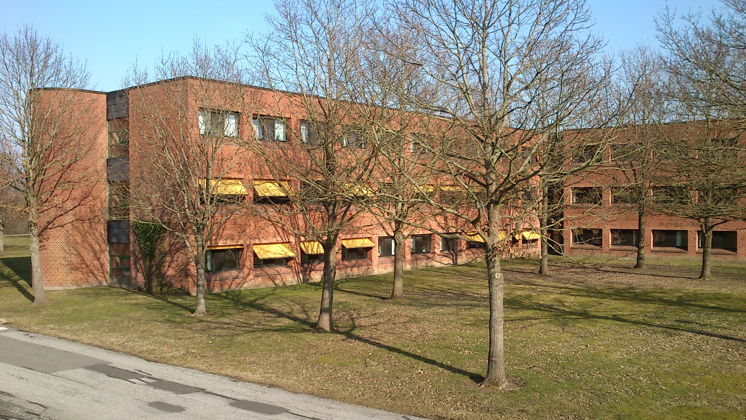 Telefonkomplekset, Jydsk telefon fra 1979. Tegnet af Friis og Moltke.